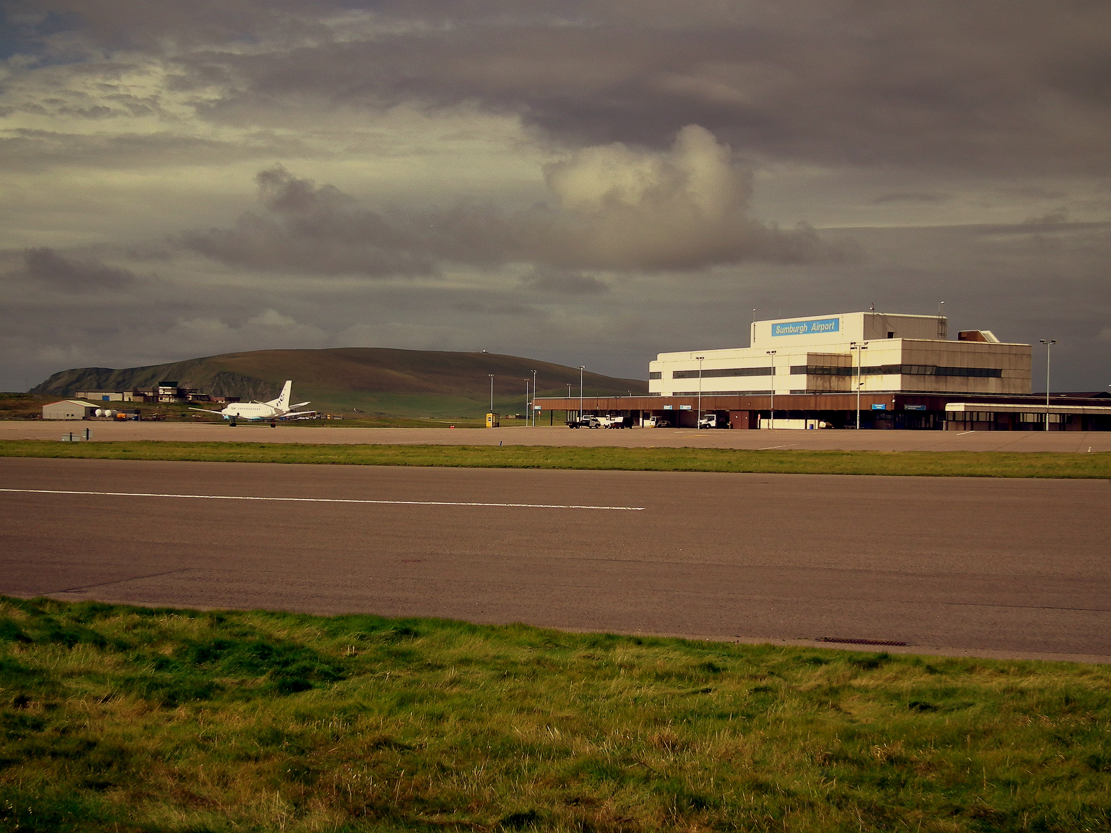 Vue de l'aéroport de Sumburgh, principal aéroport des Shetland en Écosse.